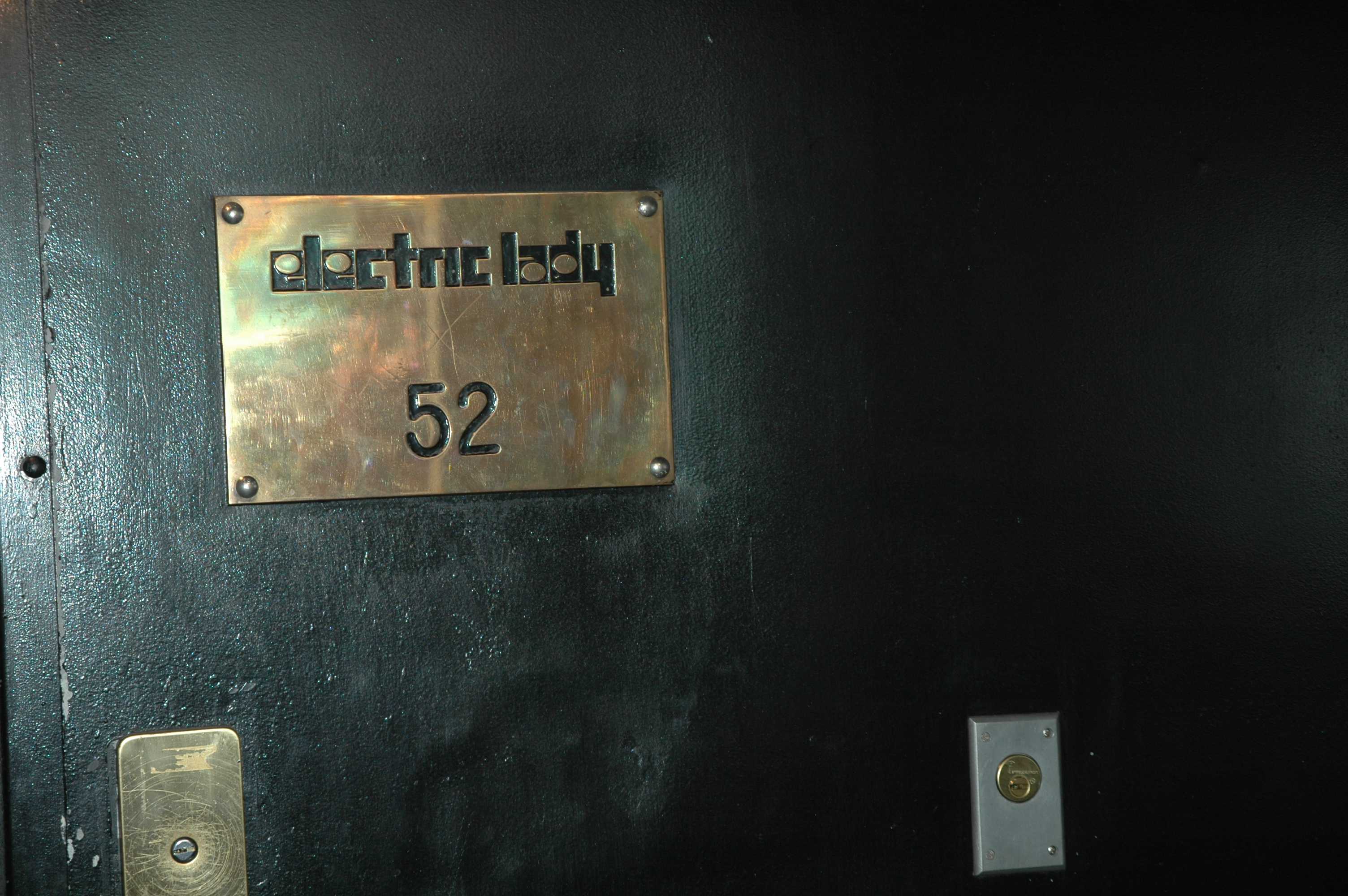 2009 - New- York